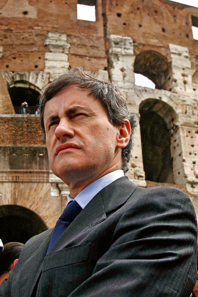 Il sindaco di Roma, Alemanno